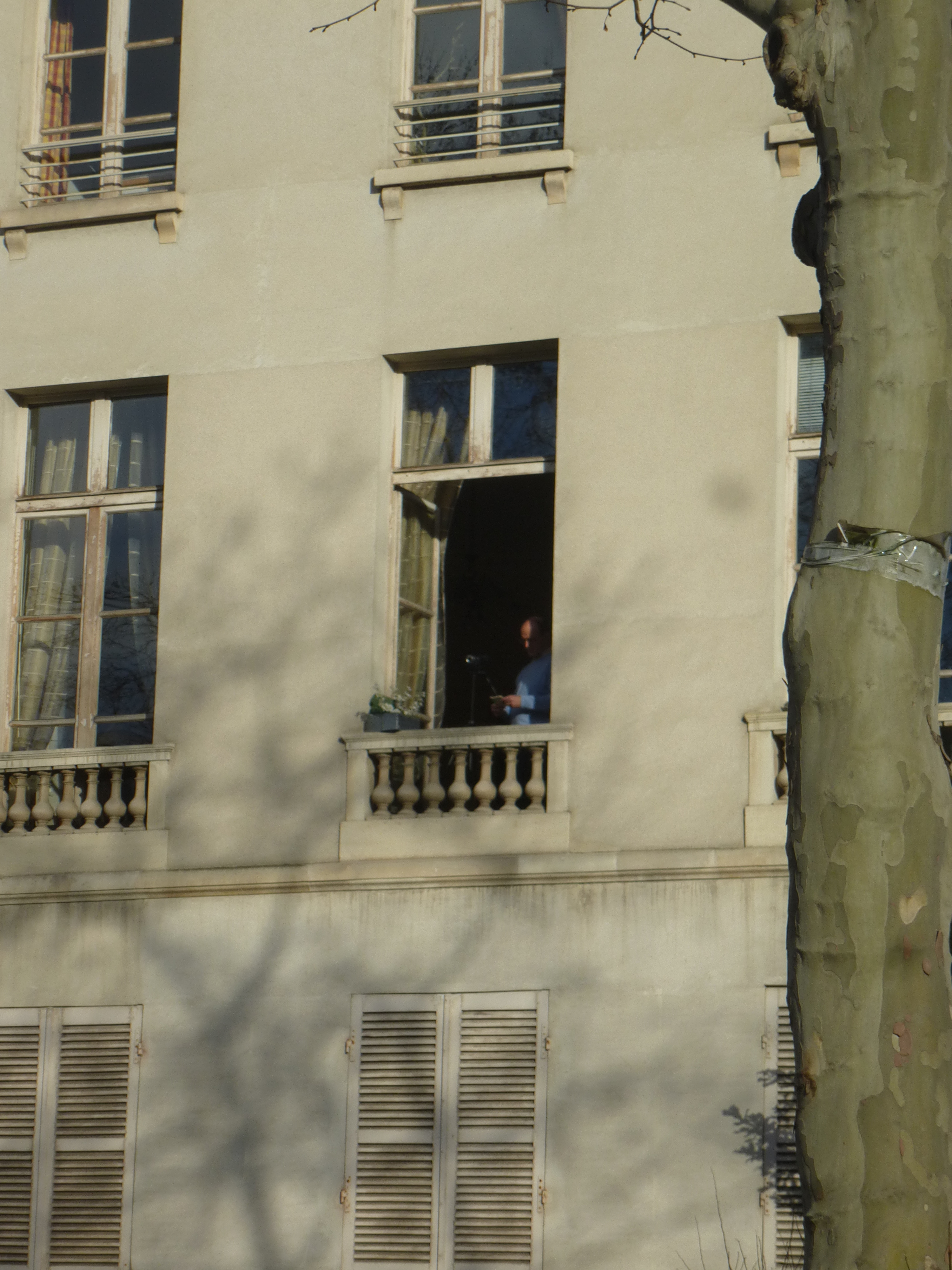 Cortège de la Manif Pour Tous du 2 février 2014 à Paris